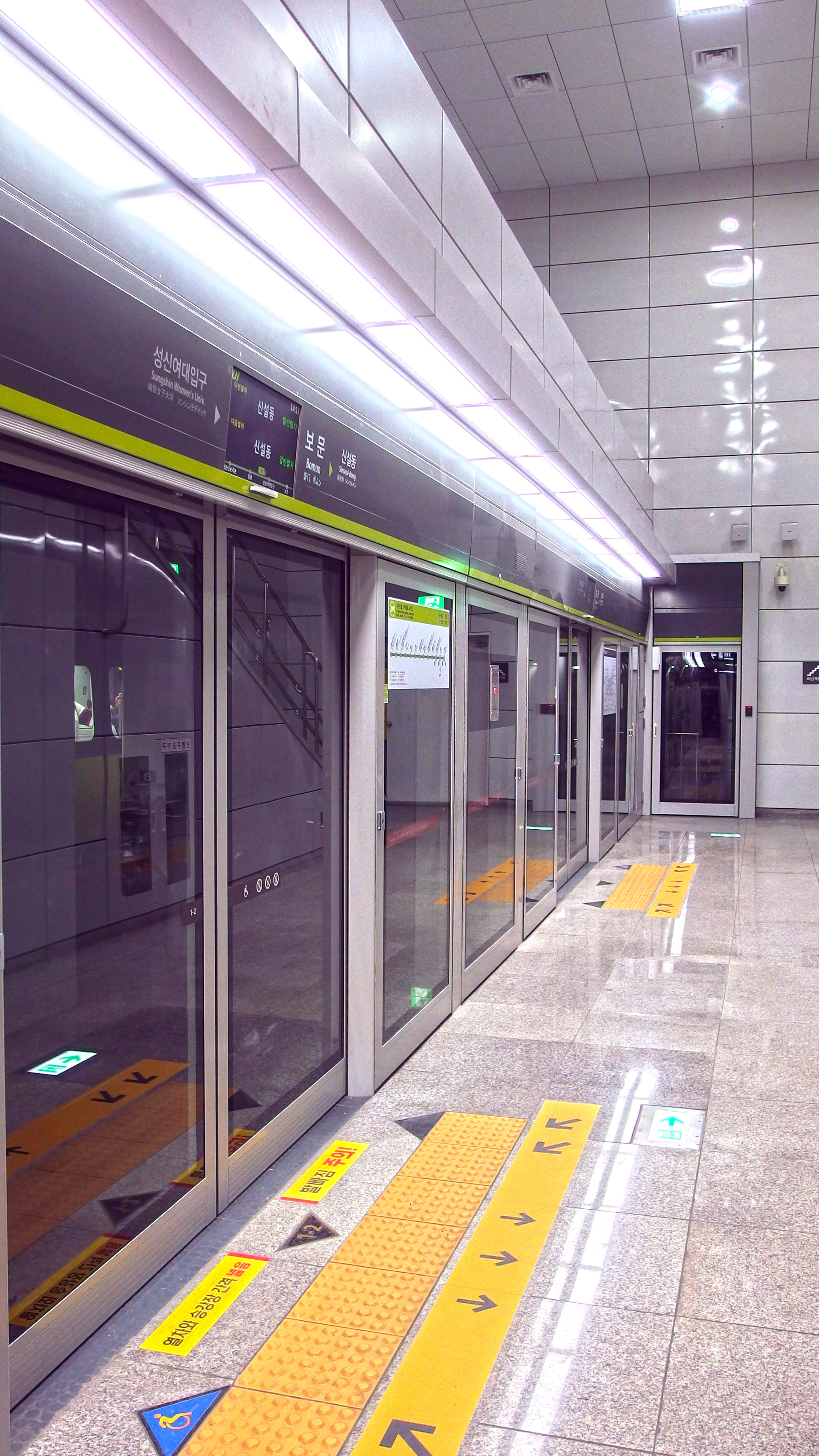 우이신설선 보문역 승강장(하행)